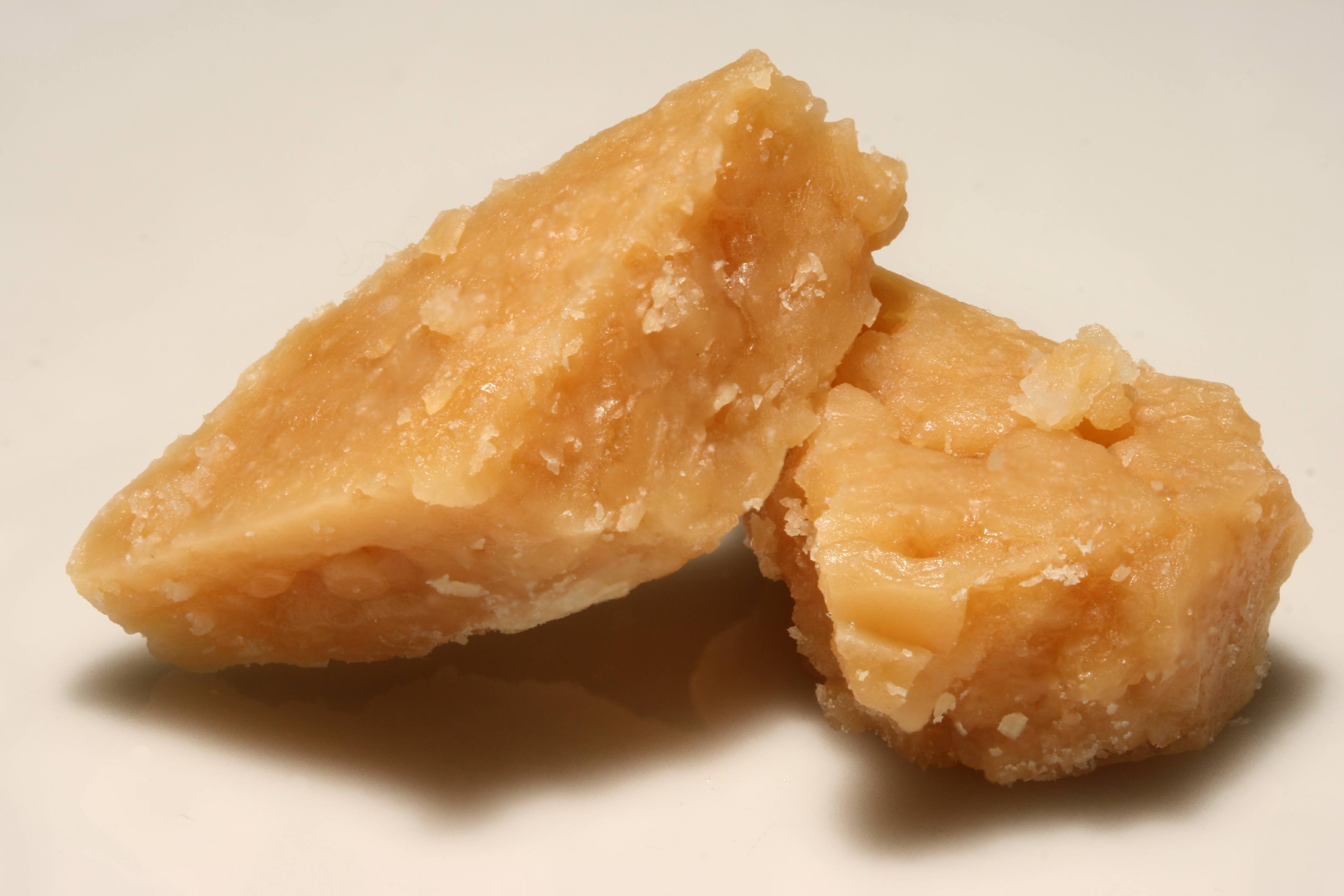 Karamell